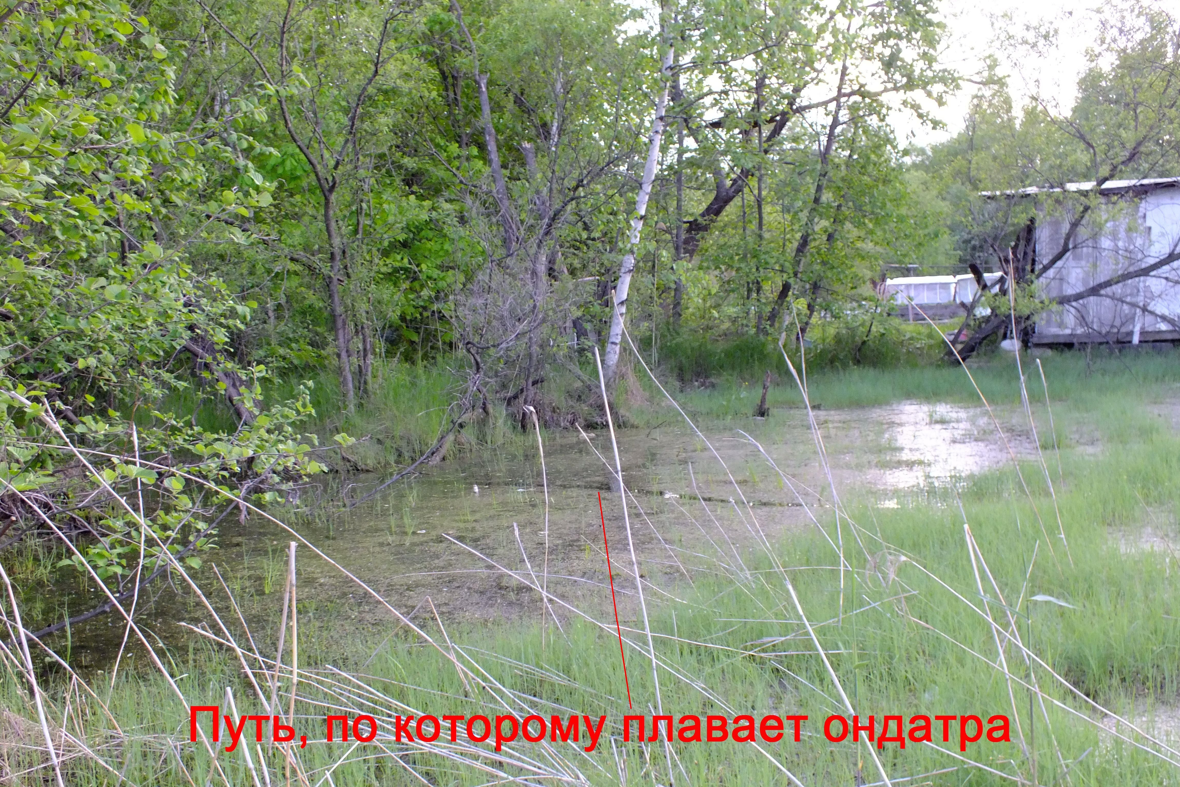 В этом болоте живут ондатры